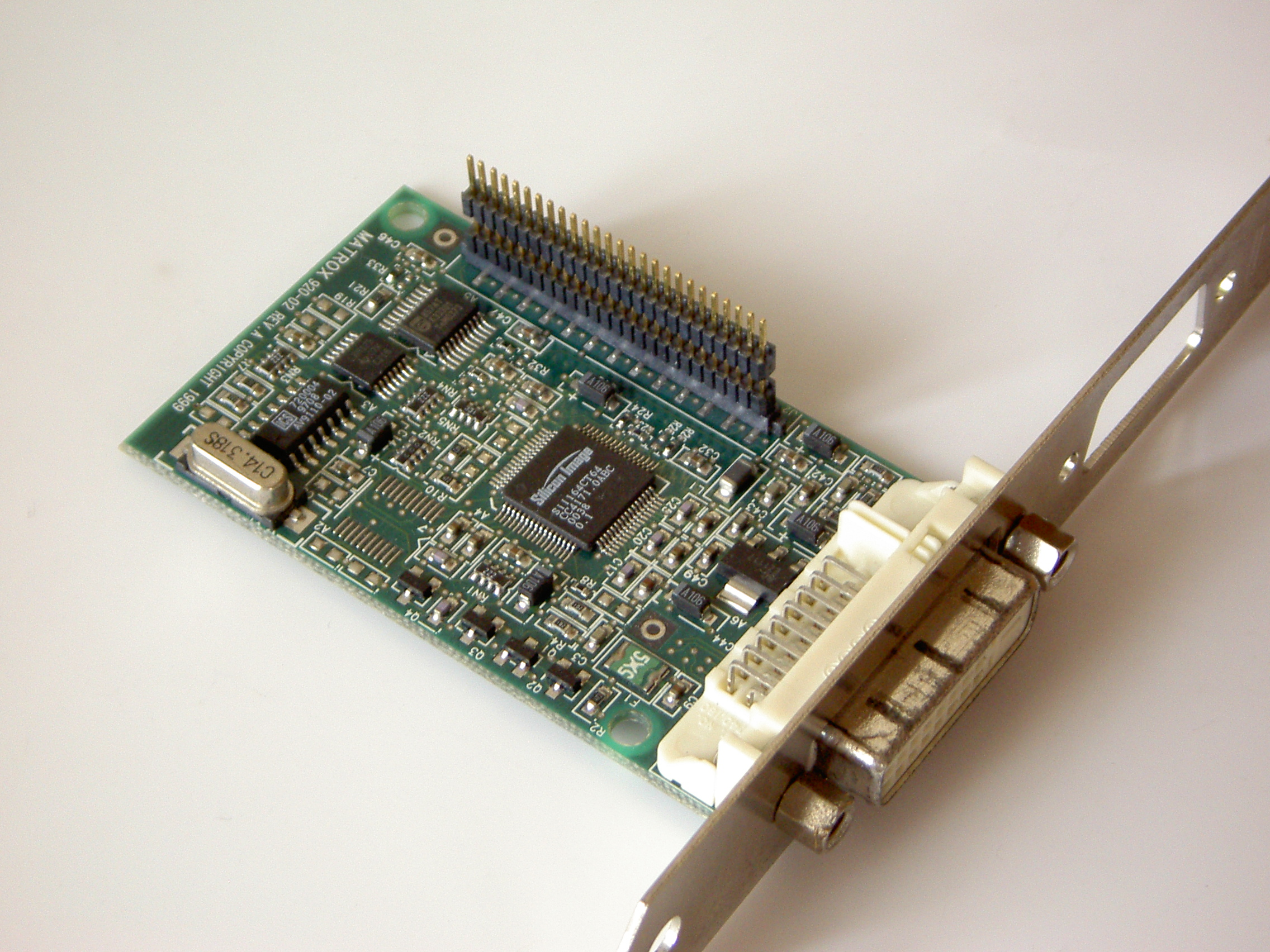 Matrox G400 Flat Panel